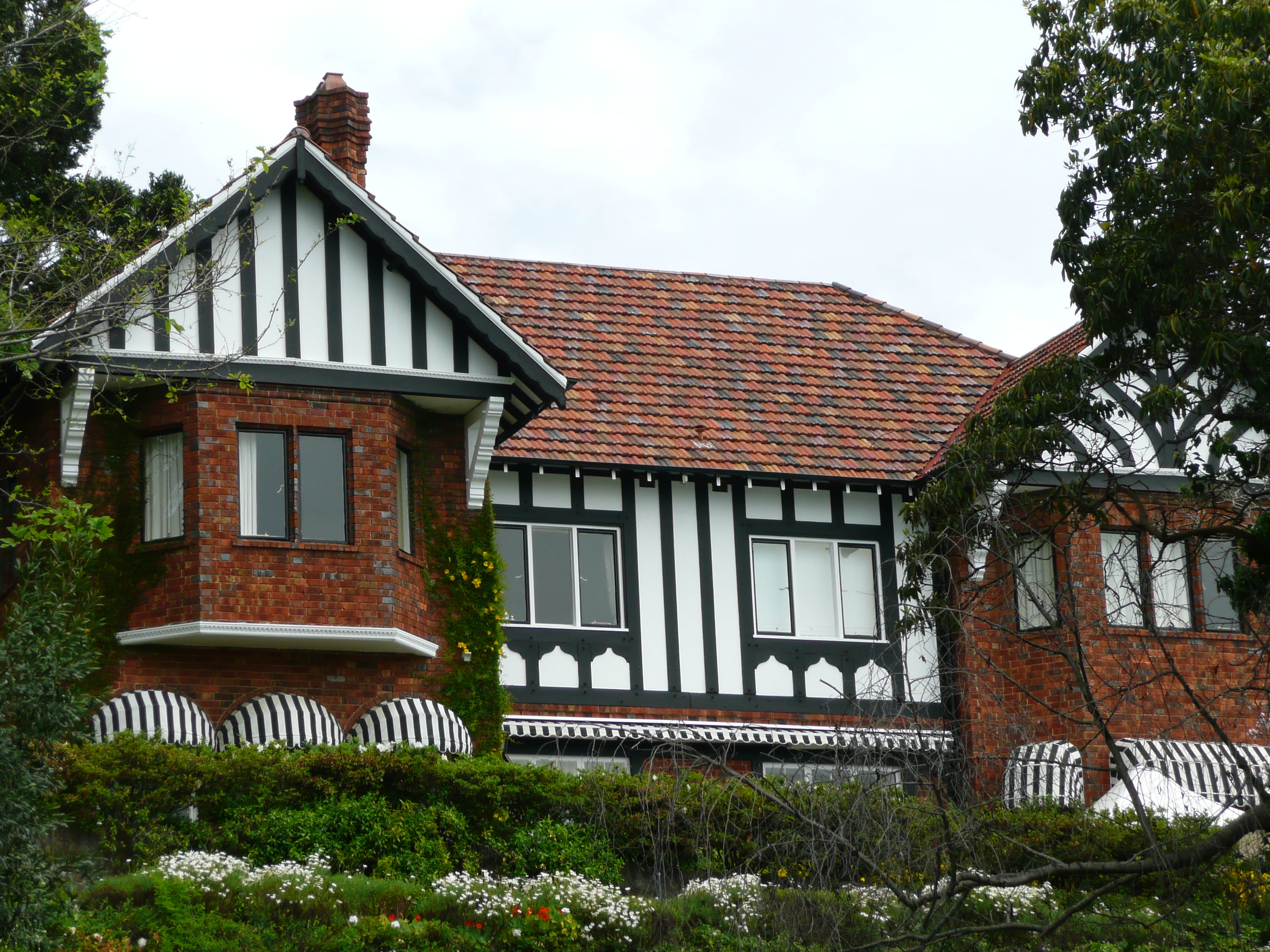 Bonnington, Bellevue Hill